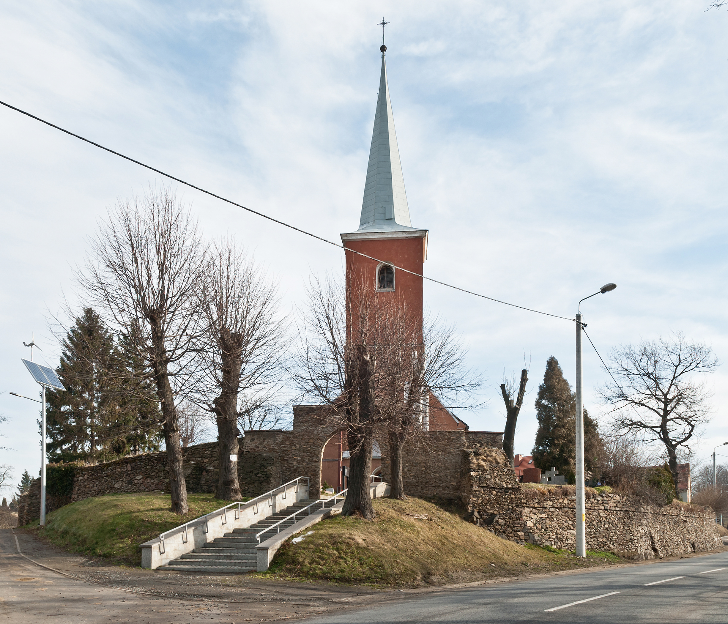 Piława Dolna, kościół par. p.w. św. Katarzyny, XV, XVIII